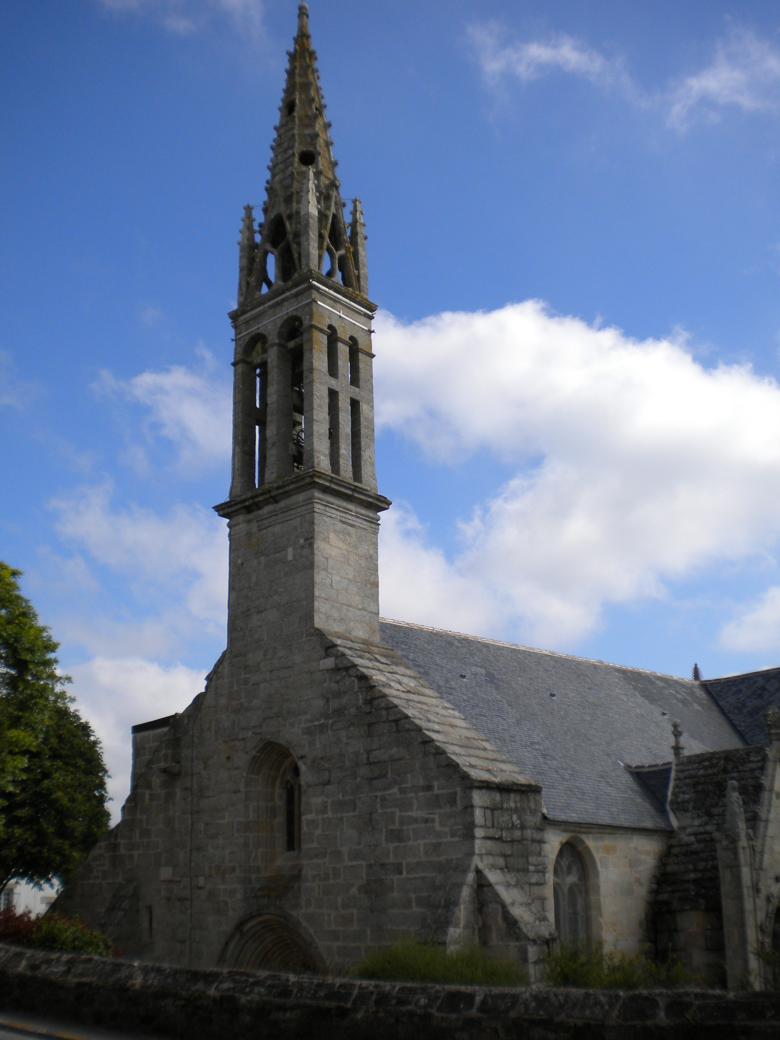 Iliz Plozeved, Bro Gerne, Breizh.